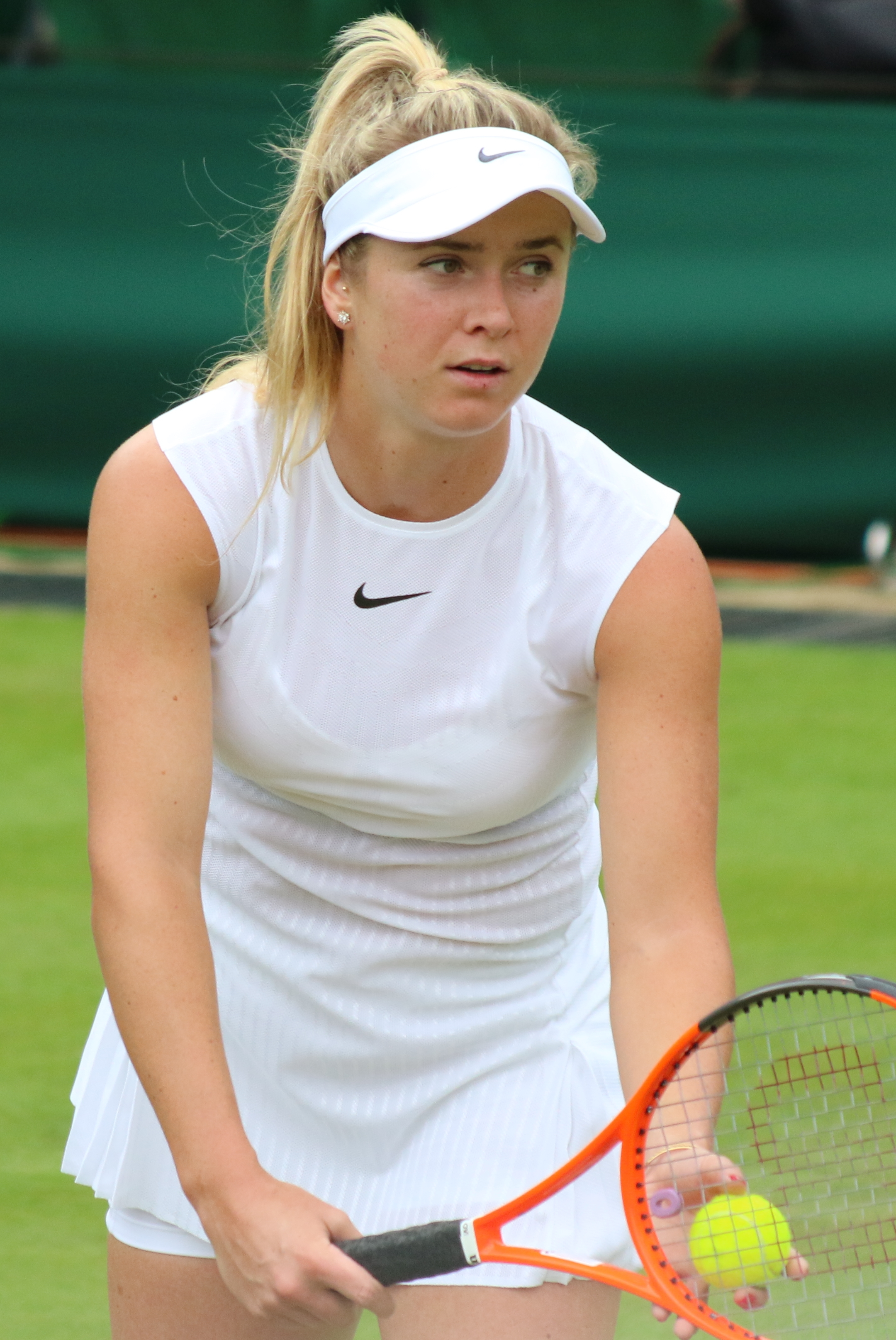 Svitolina WM17 (25)